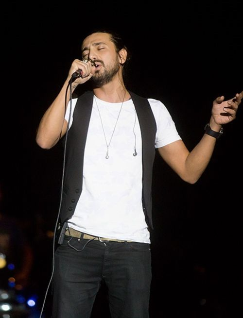 امیرعباس گلاب - تیر ۱۳۹۶